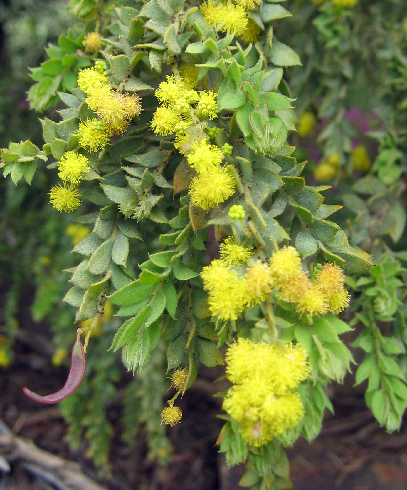 Acacia cultiformis, en Jardí Botànic de Caixa de Girona-Cap Roig